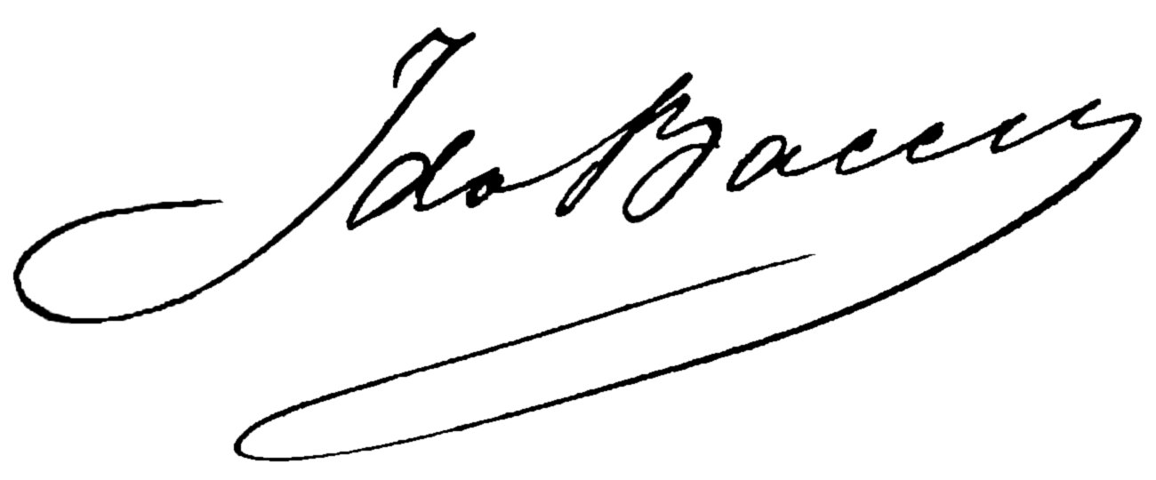 Firma autografa di Ida Baccini dal volume La mia vita del 1904.